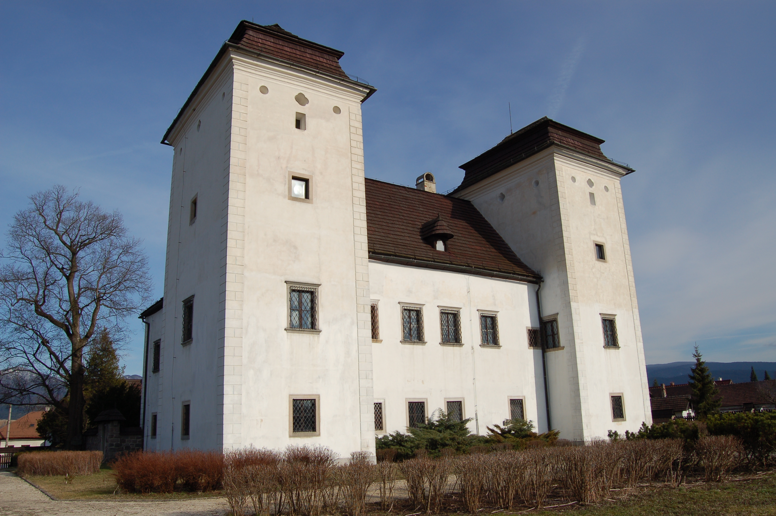 Renesančný kaštieľ v Diviakoch (mestská časť Turčianskych Teplíc).